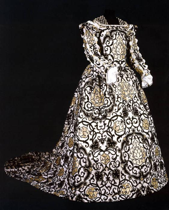 Playing dress renaissance of the sixteenth century